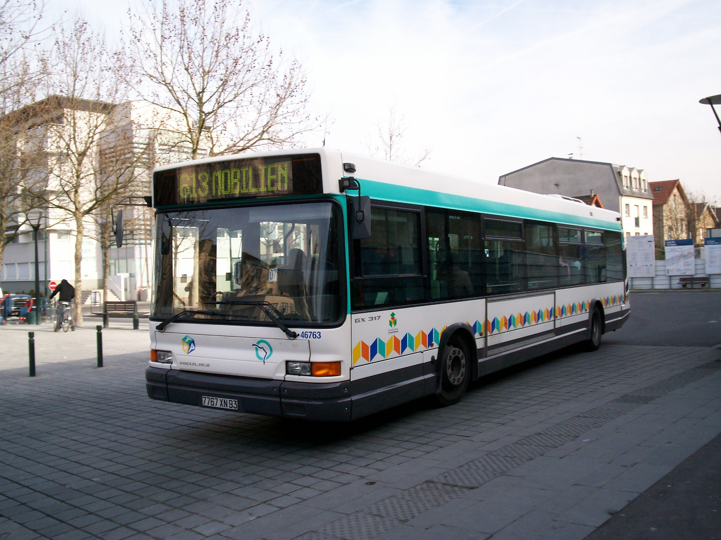 Bus à la gare routière